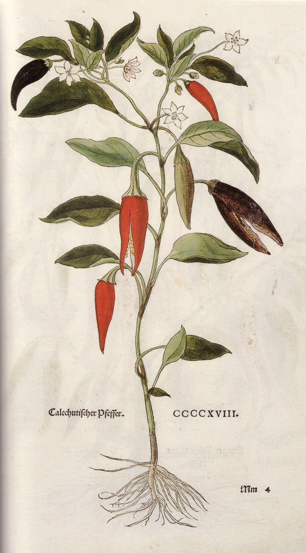 Calechutischer Pfeffer = Capsicum annuum, Table CCCCXVIII